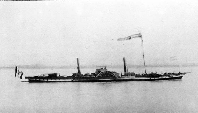 Raddampfschlepper Stinnes 3, erbaut 1866